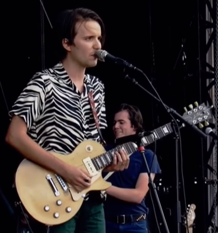 Theo Lawrence au festival Rock en Seine 2018